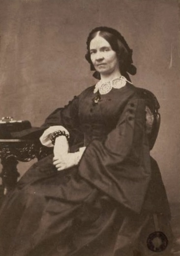 Narcyza Żmichowska (1819-1876)